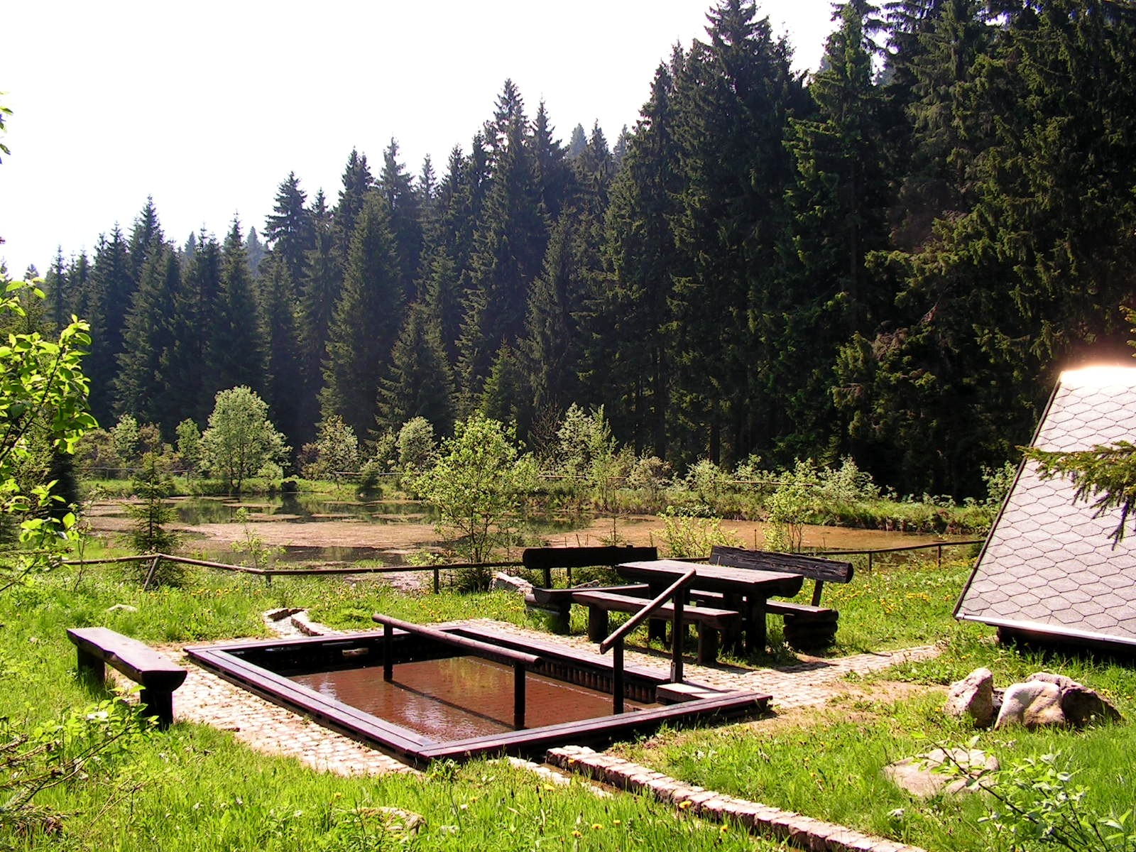 Kneippanlage am alten Mittenwaldfreibad Wildenthal (Eibenstock)